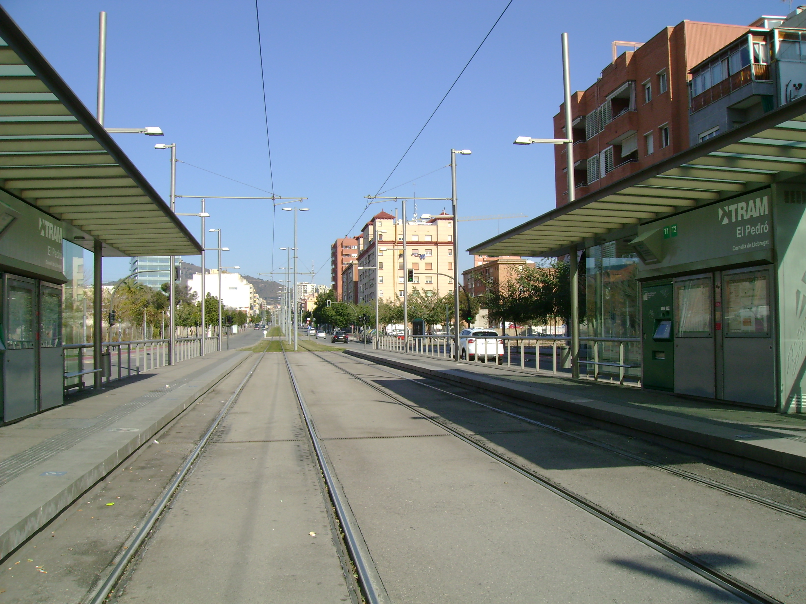 Foto capturada per la meva càmara a l'estació del Pedró (Trambaix).